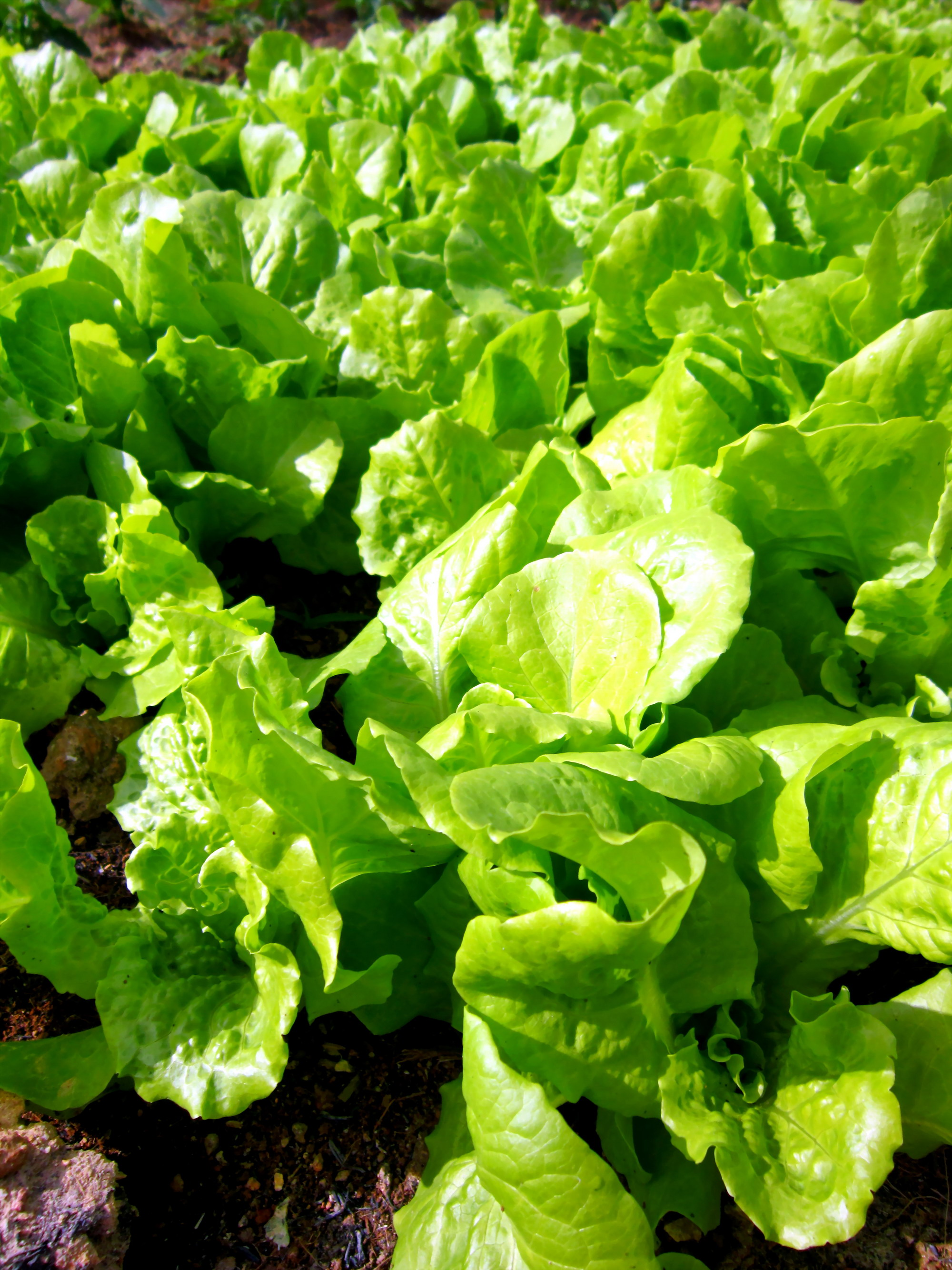 Xà lách ở miền Nam Việt Nam.